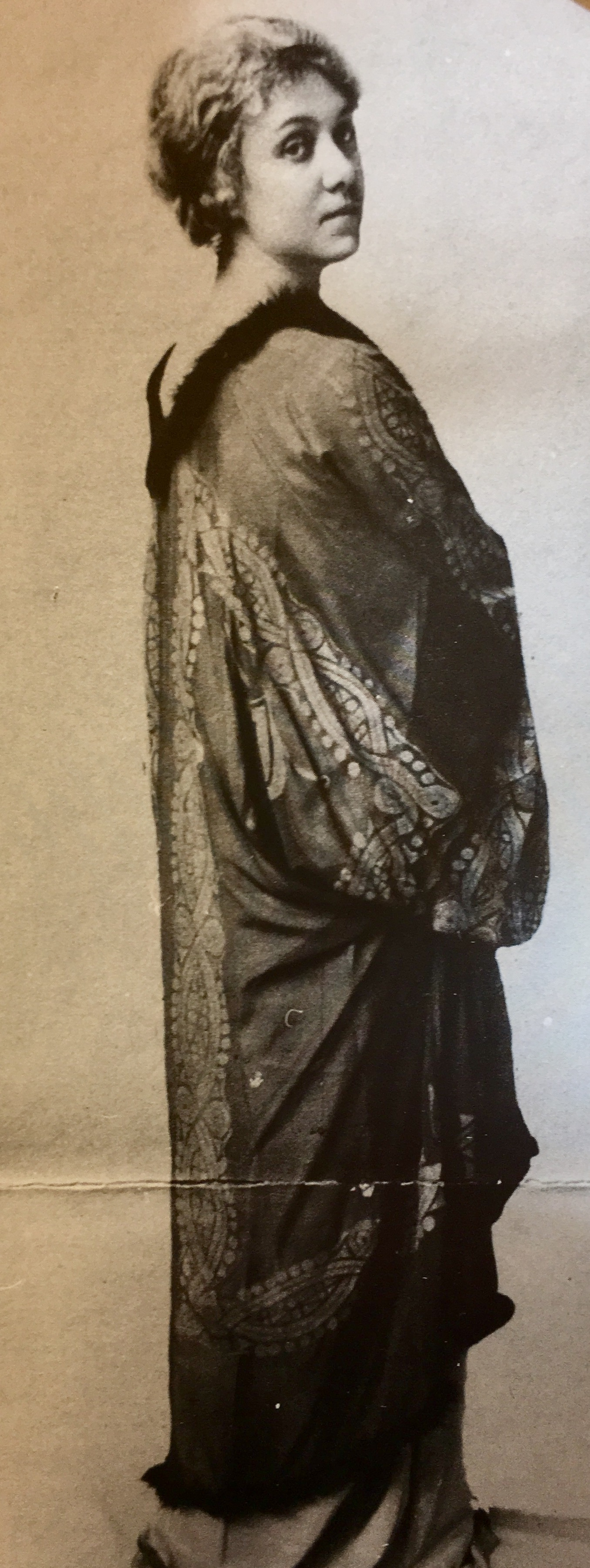 Maria Monaci Gallenga nel 1918 con un abito stampato di sua creazione.